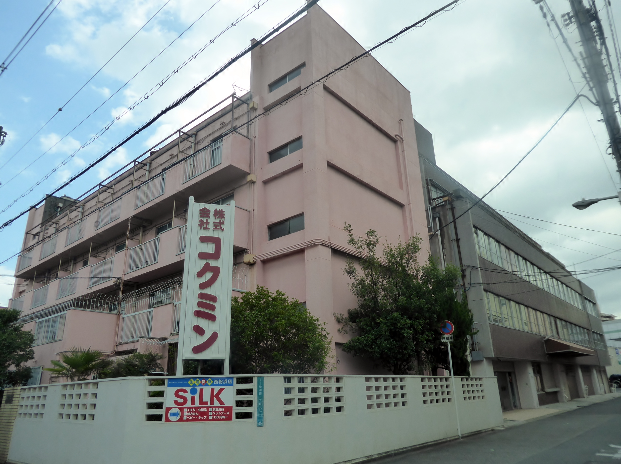 株式会社コクミン本社を撮影。